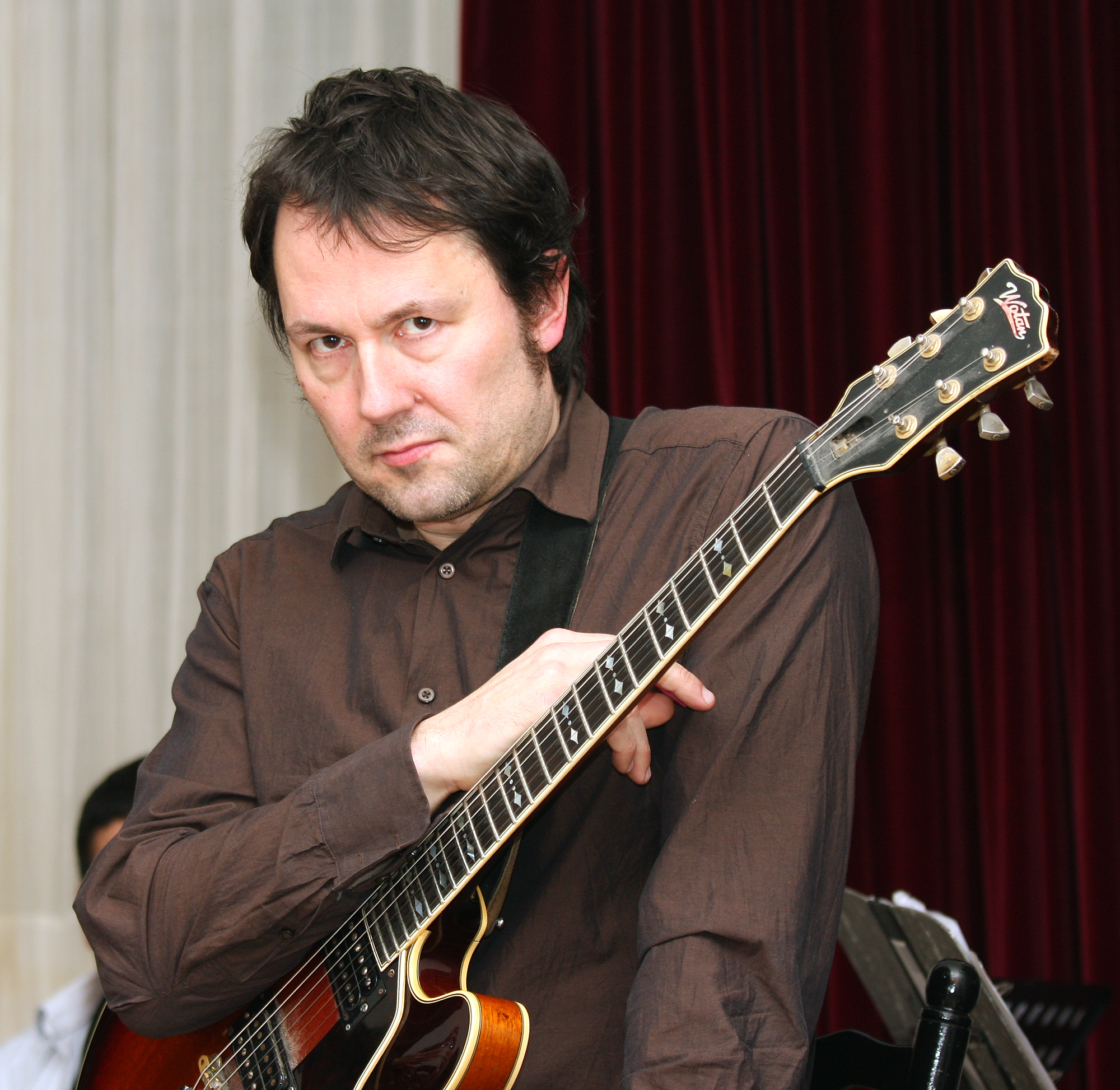 Norbert Scholly, deutscher Jazz-Gitarrist Wotan Archtop Semi-Acoustic